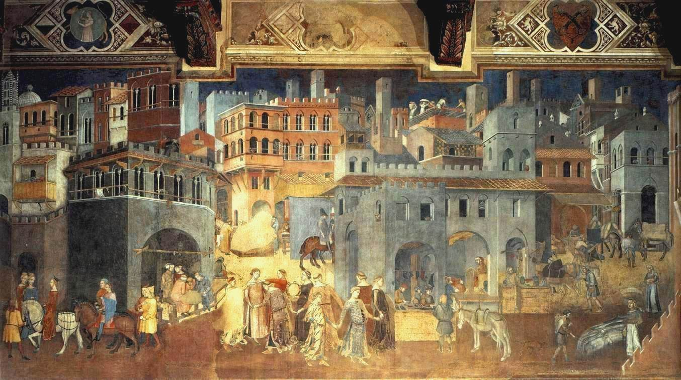 Lorenzetti_amb.effect2.jpg